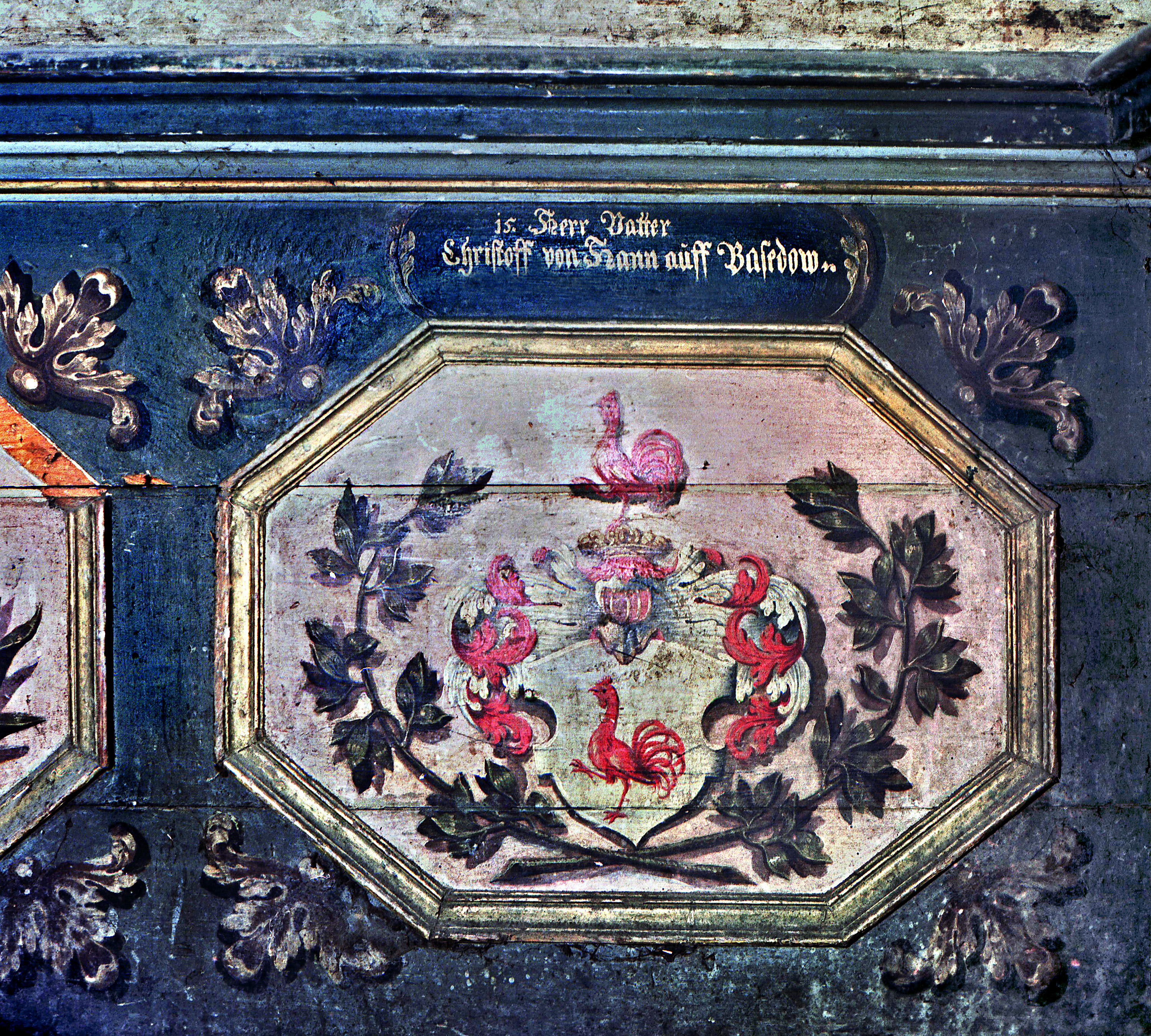 24.09.1987 2561 Hohen Luckow (Satow): Herrenhaus Hohen Luckow (GMP: 53.983689,11.961824), erbaut 1707-1708 unter Christoph von Bassewitz. In der DDR Volkseigenes Gut. Rittersaal im OG mit unterhalb der Fenster umlaufenden hölzernen Brüstungsverkleidung mit gemalten Wappentafeln mecklenburgischer Adelsgeschlechter. Inschrift: "15. Herr Vatter Christoff von Hann auf Basedow" 19870924B03.jpg]19870924550NR.JPG(c)Blobelt